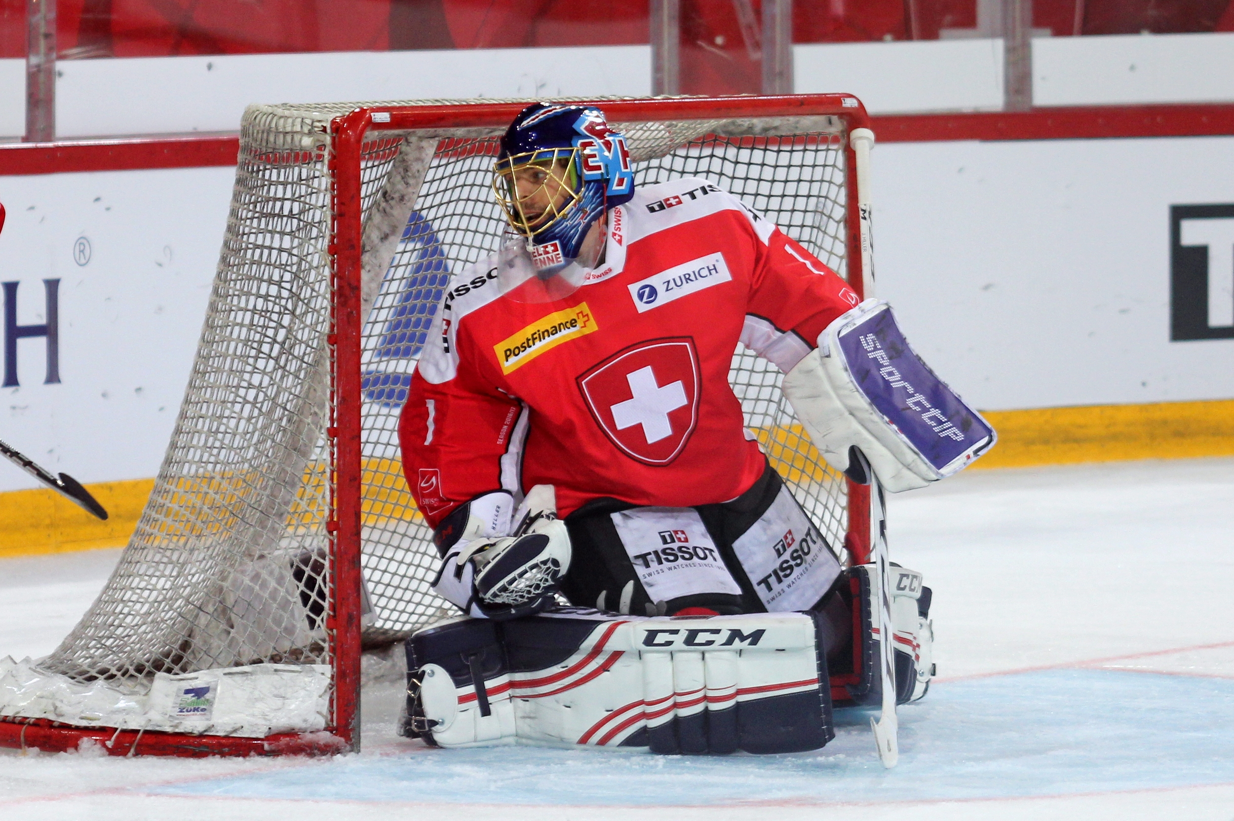 Jonas Hiller (S 1).